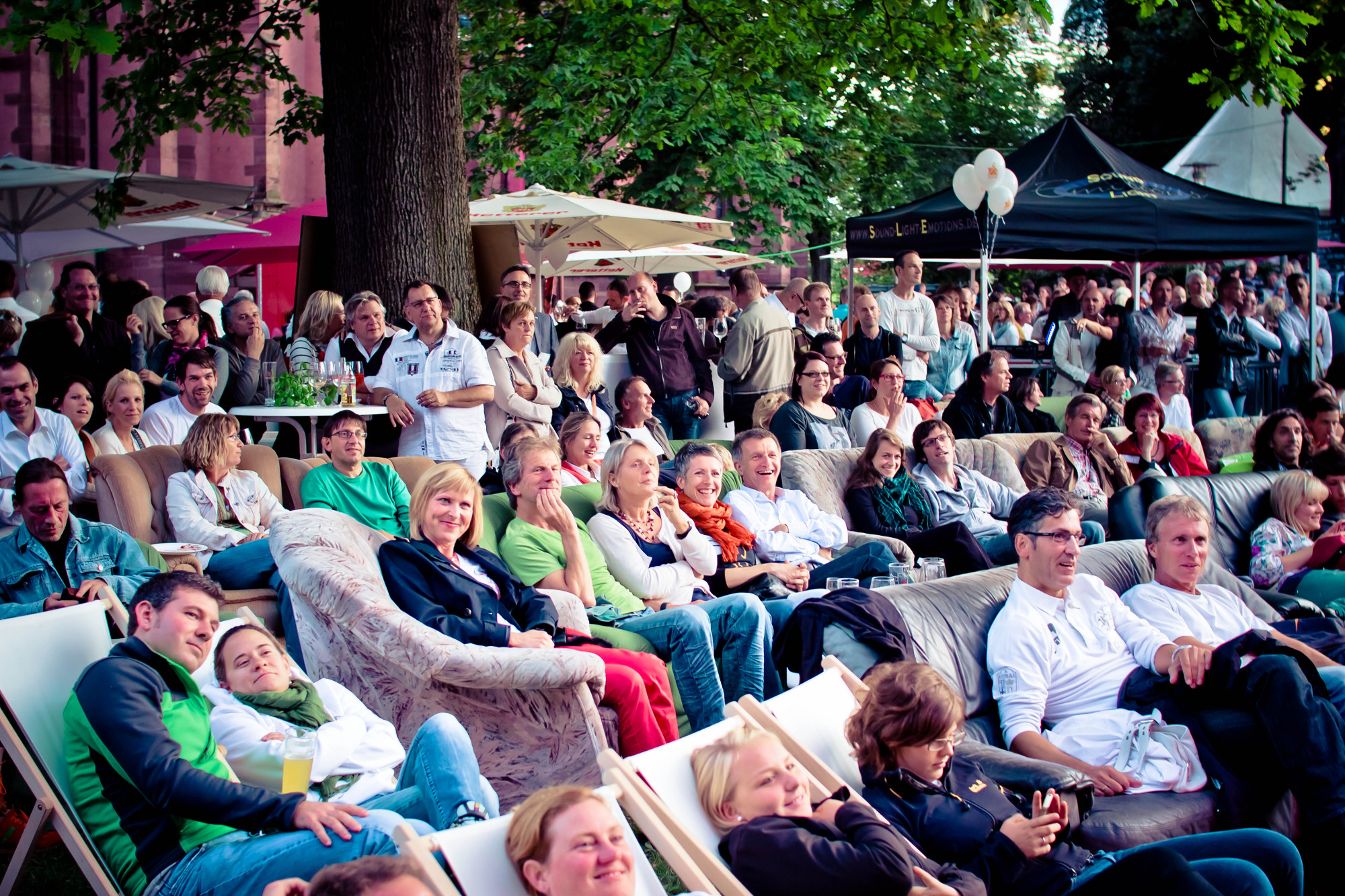 Europäische Sommerloung in Pforzheim